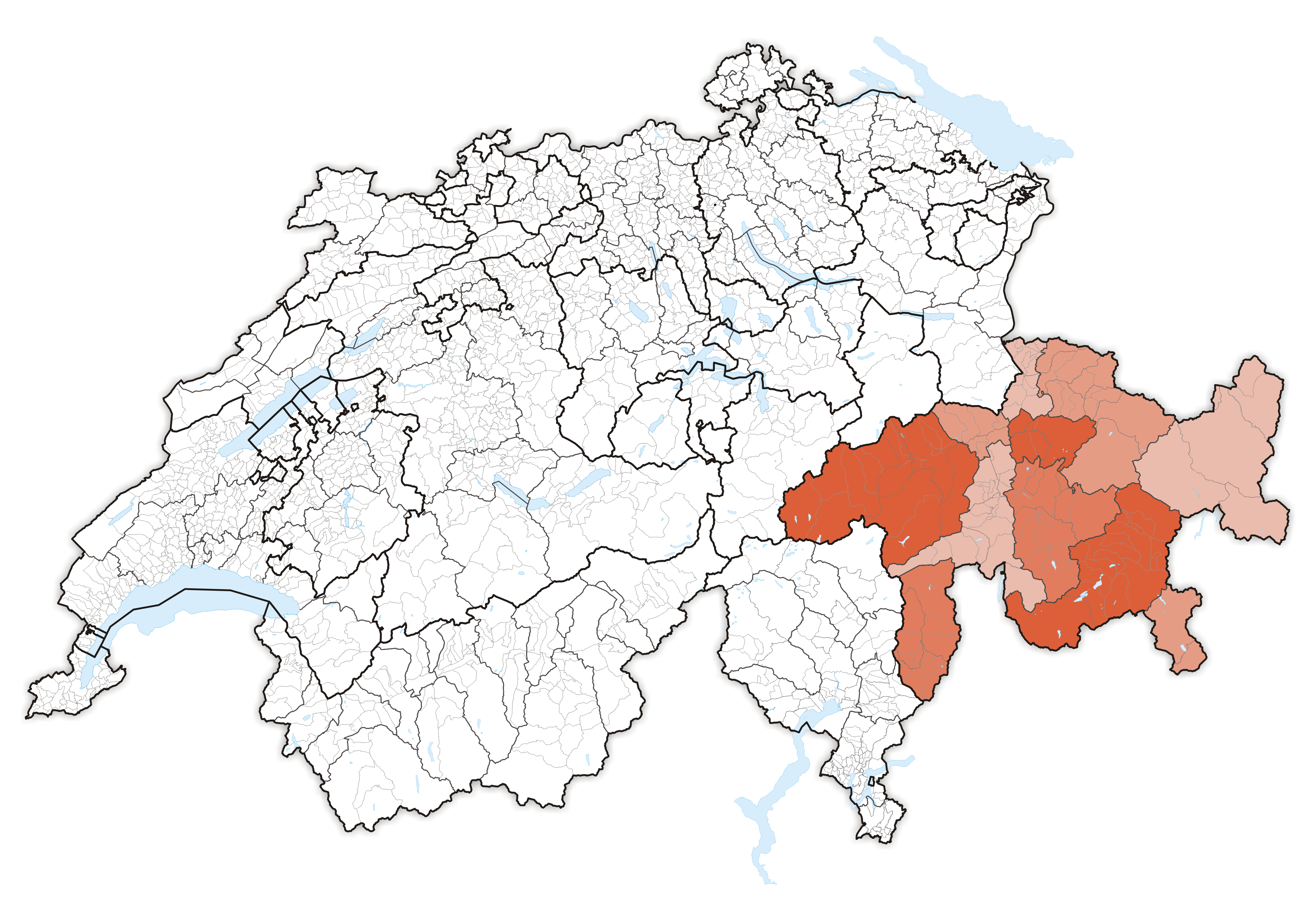 Canton Graubünden